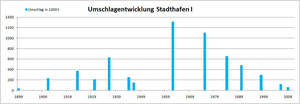 Tabelle: Umschlagentwicklung im Hafen Münster